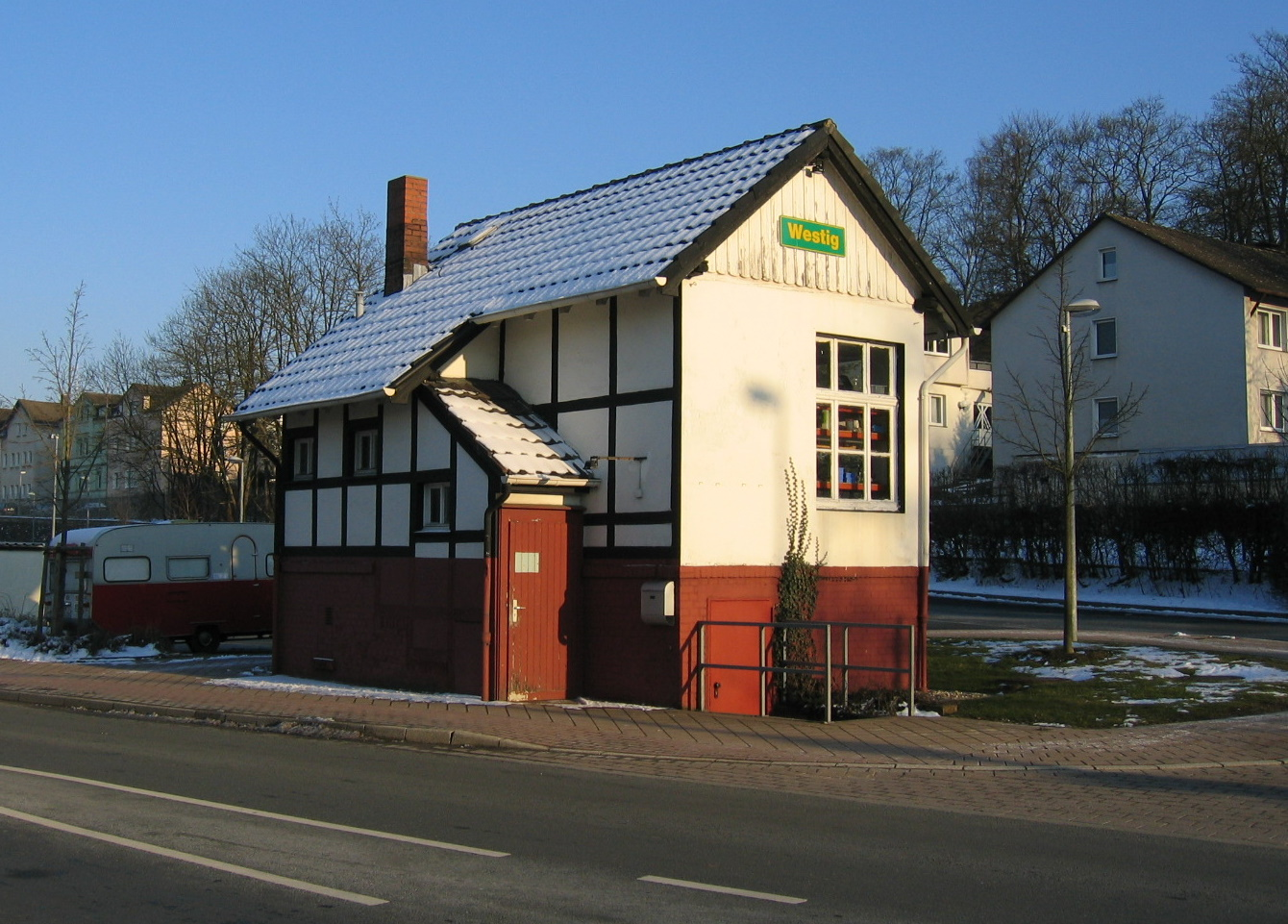 Description